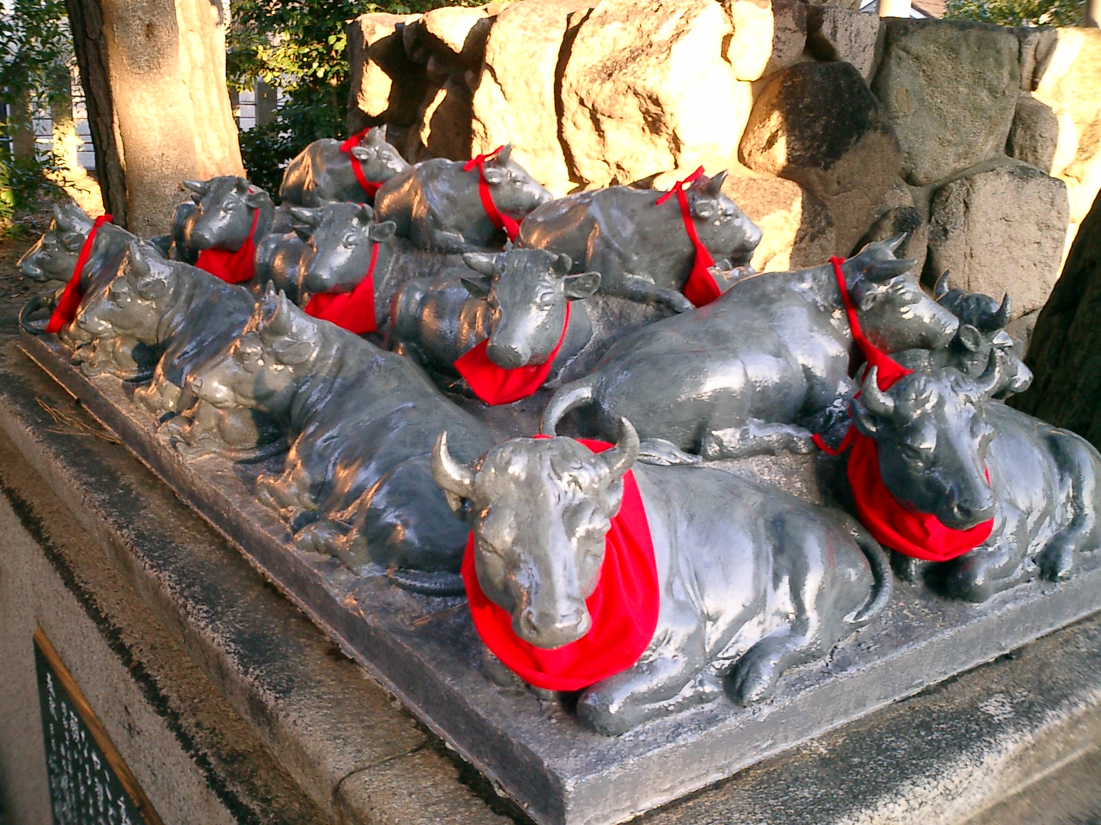 fushigyu